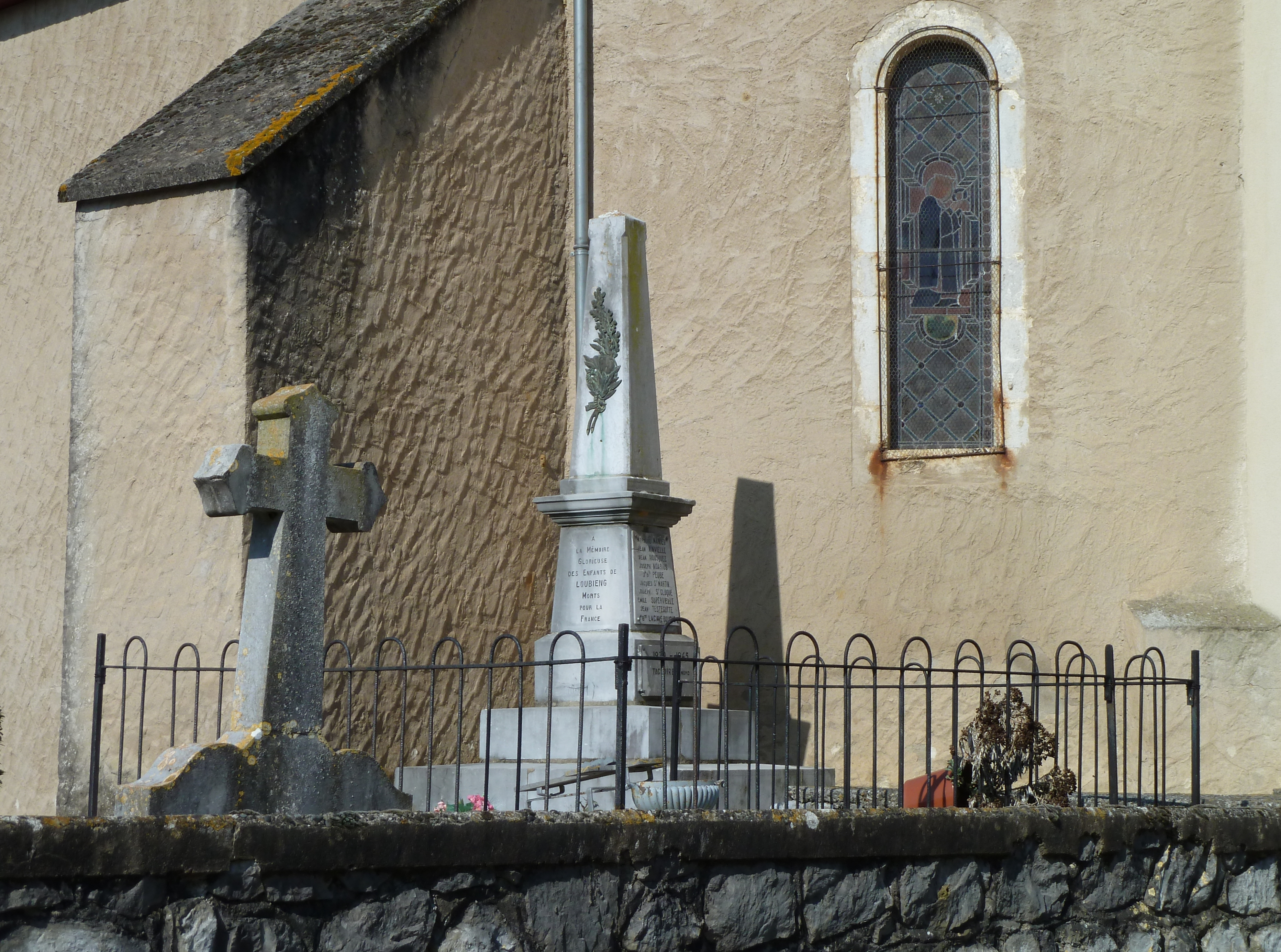 Monument aux morts de Loubieng